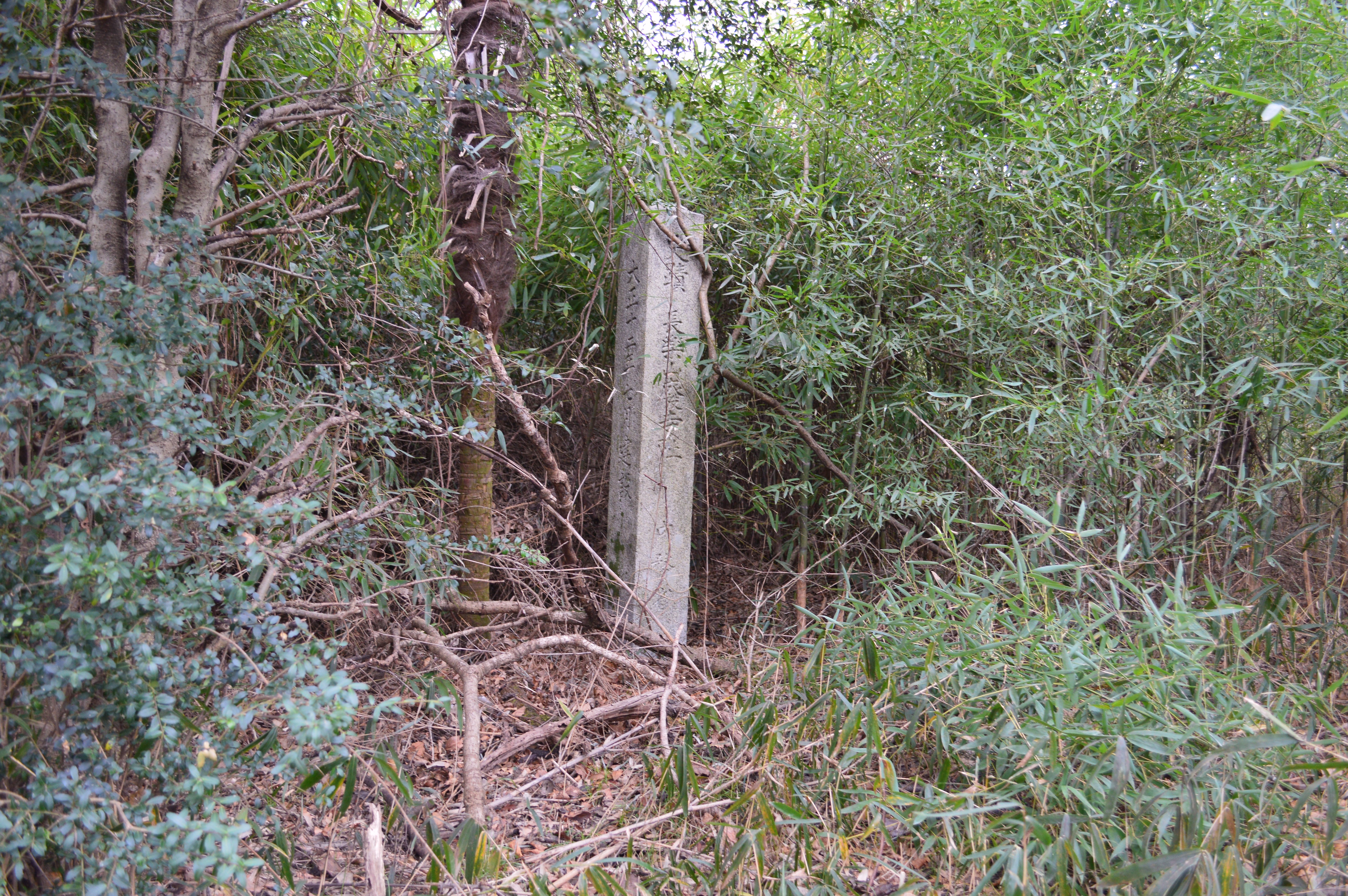 長楽山廃寺跡 石碑